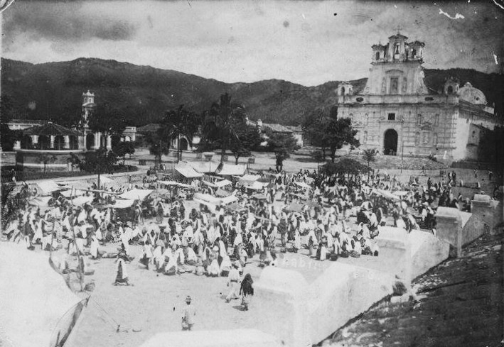 Rabinal, Alta Verapaz en 1927.